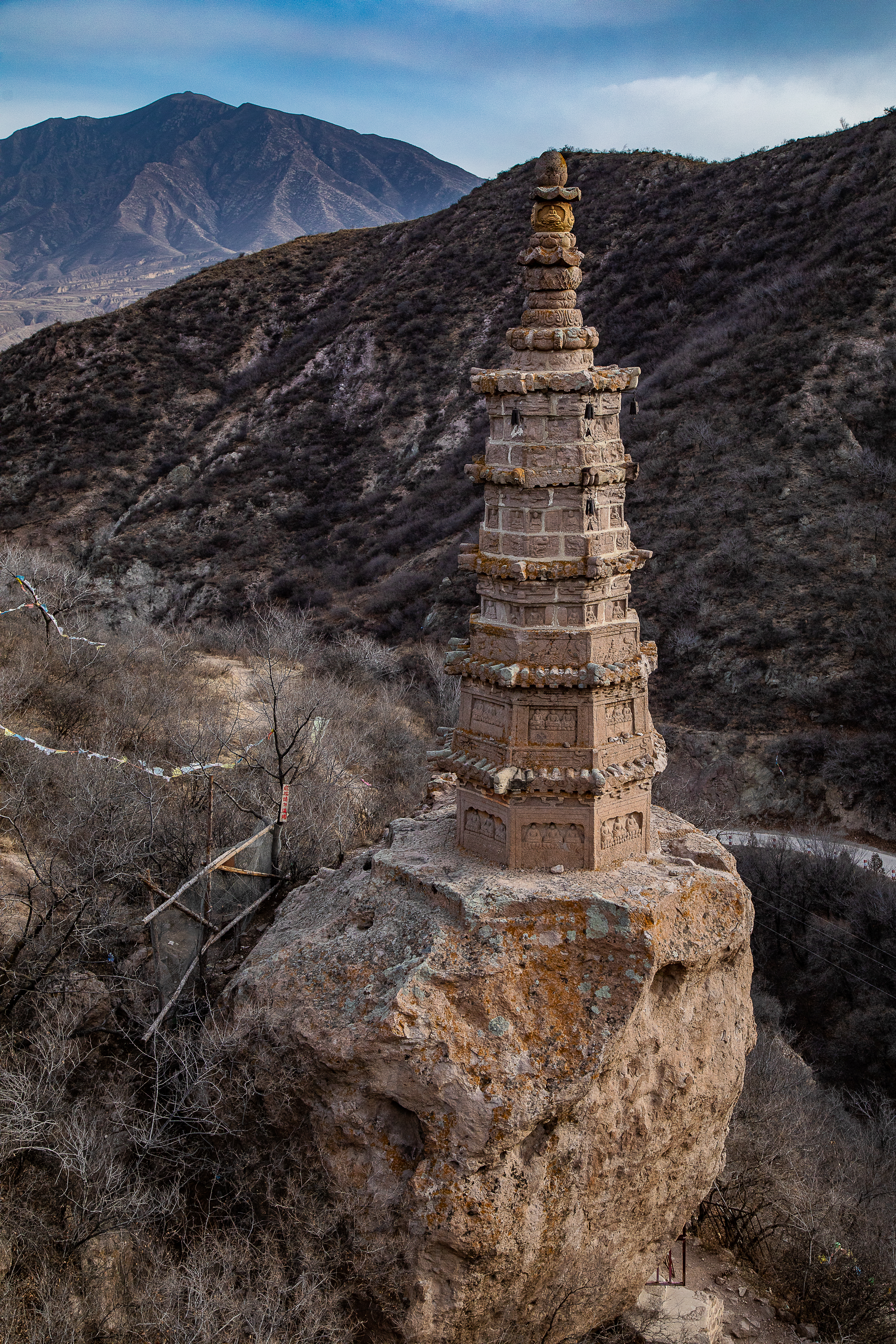 张家口宣化柏林寺多宝佛塔